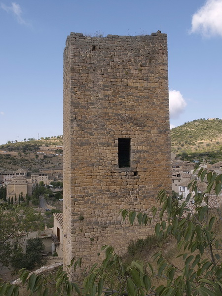 Torreón existente del Castillo de la Colegiata de Santa Maria